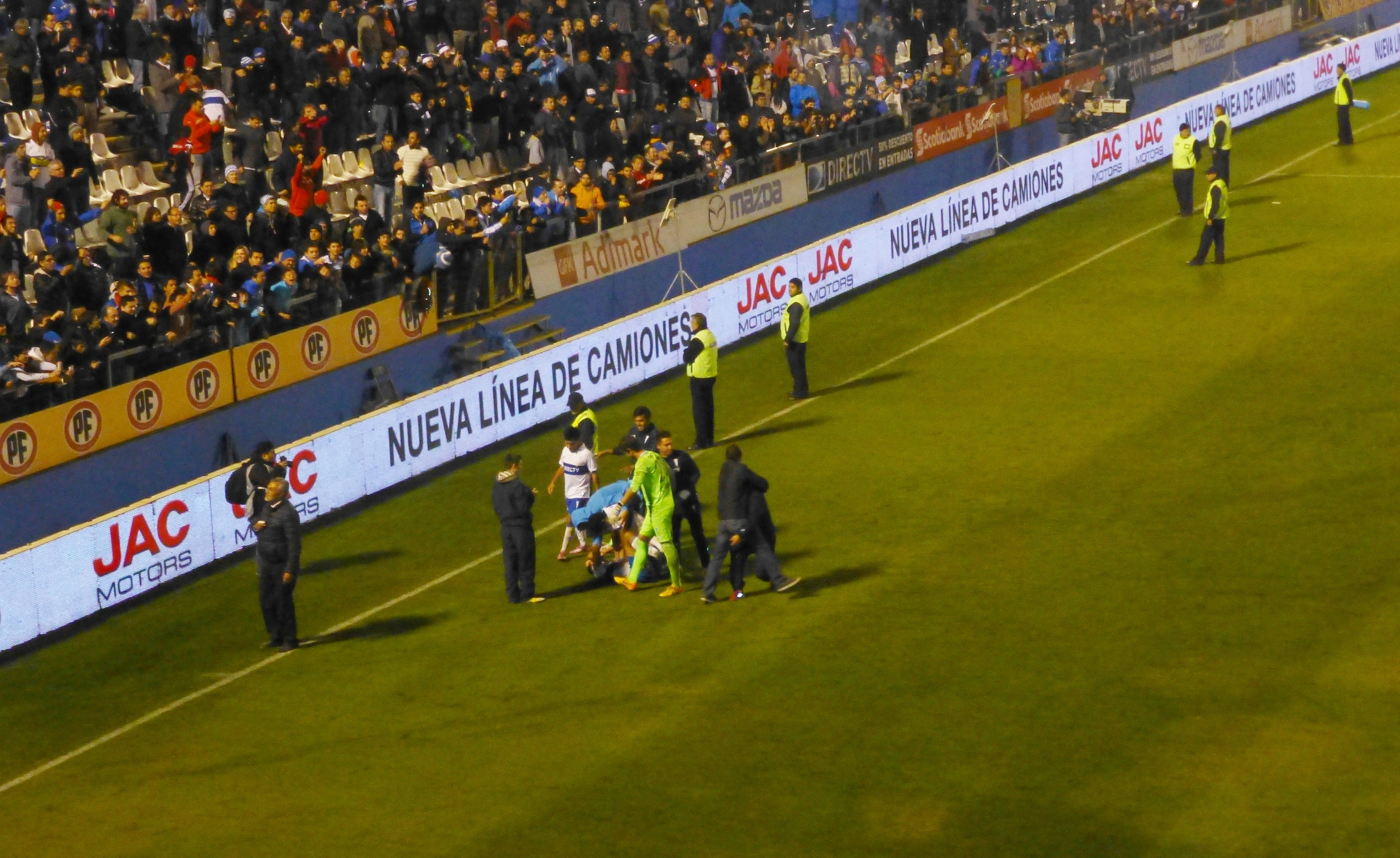 Universidad Católica festeja la obtención de la Liguilla 2015 y la clasificación a Copa Sudamericana